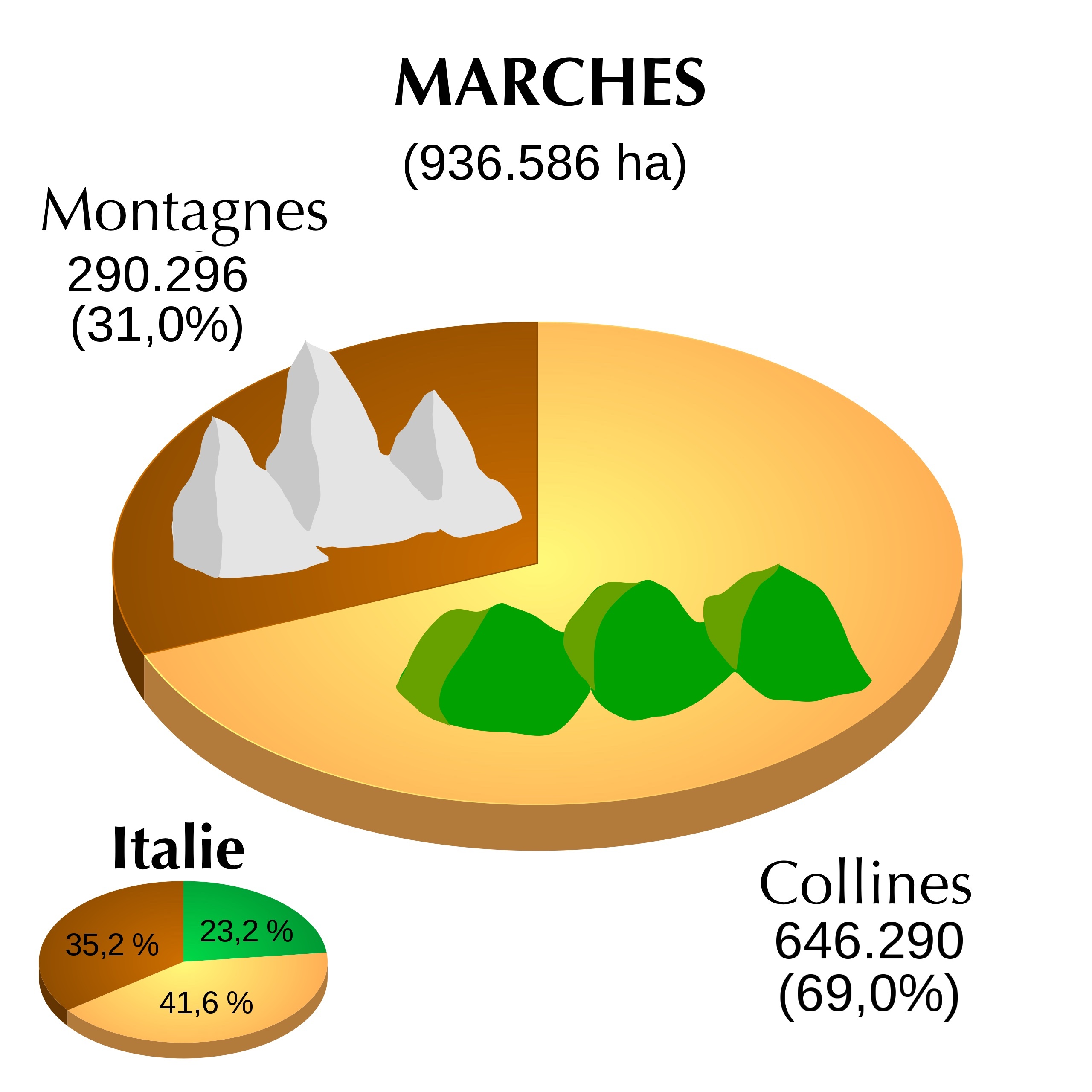 Altimétrie des Marches - traduction du graphe de Luigi Chiesa